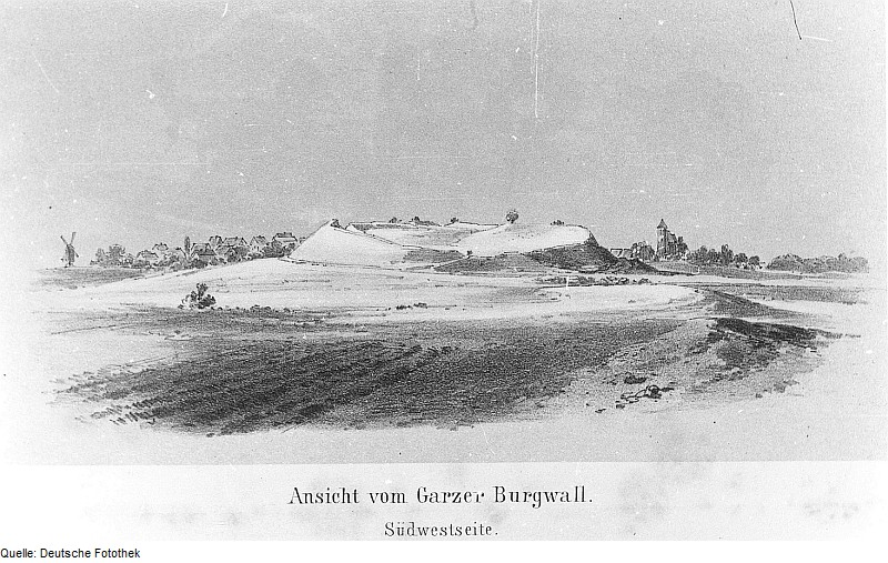 Original image description from the Deutsche FotothekGarz/Rügen. Garzer Burgwall, aus: Baltische Studien, 24. Jg., Stettin 1872